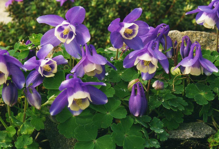 Aquilegia pyrenaica subsp. discolor